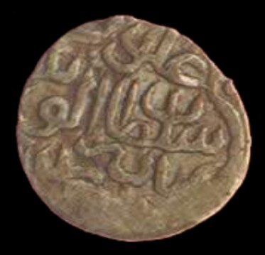 Ağqoyunlu, Əlvənd təngə, gümüş